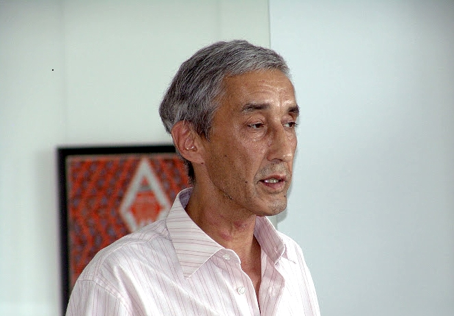 Атнер Хузангай на открытии выставки в Чувашском художественном музее (Чебоксары), 2008 год.